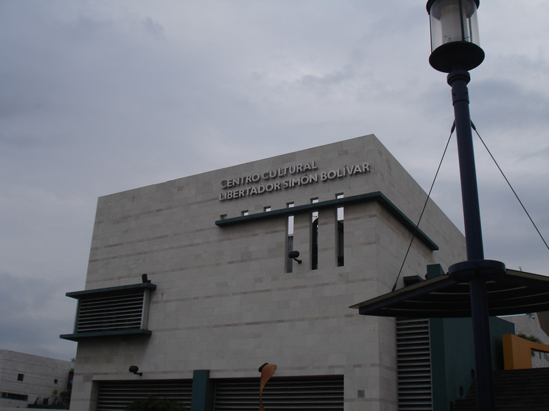 Museo Antropológico y de Arte Contemporáneo MAAC en Guayaquil.